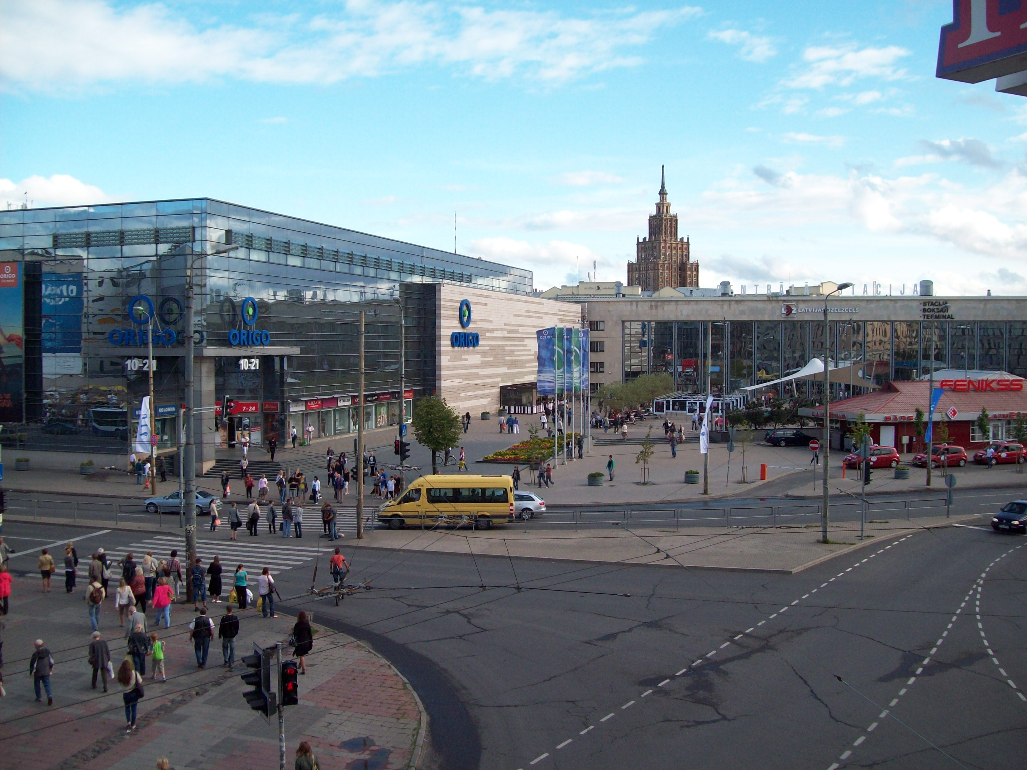 Centrālā Stacija Riga, Central Station Riga 2011